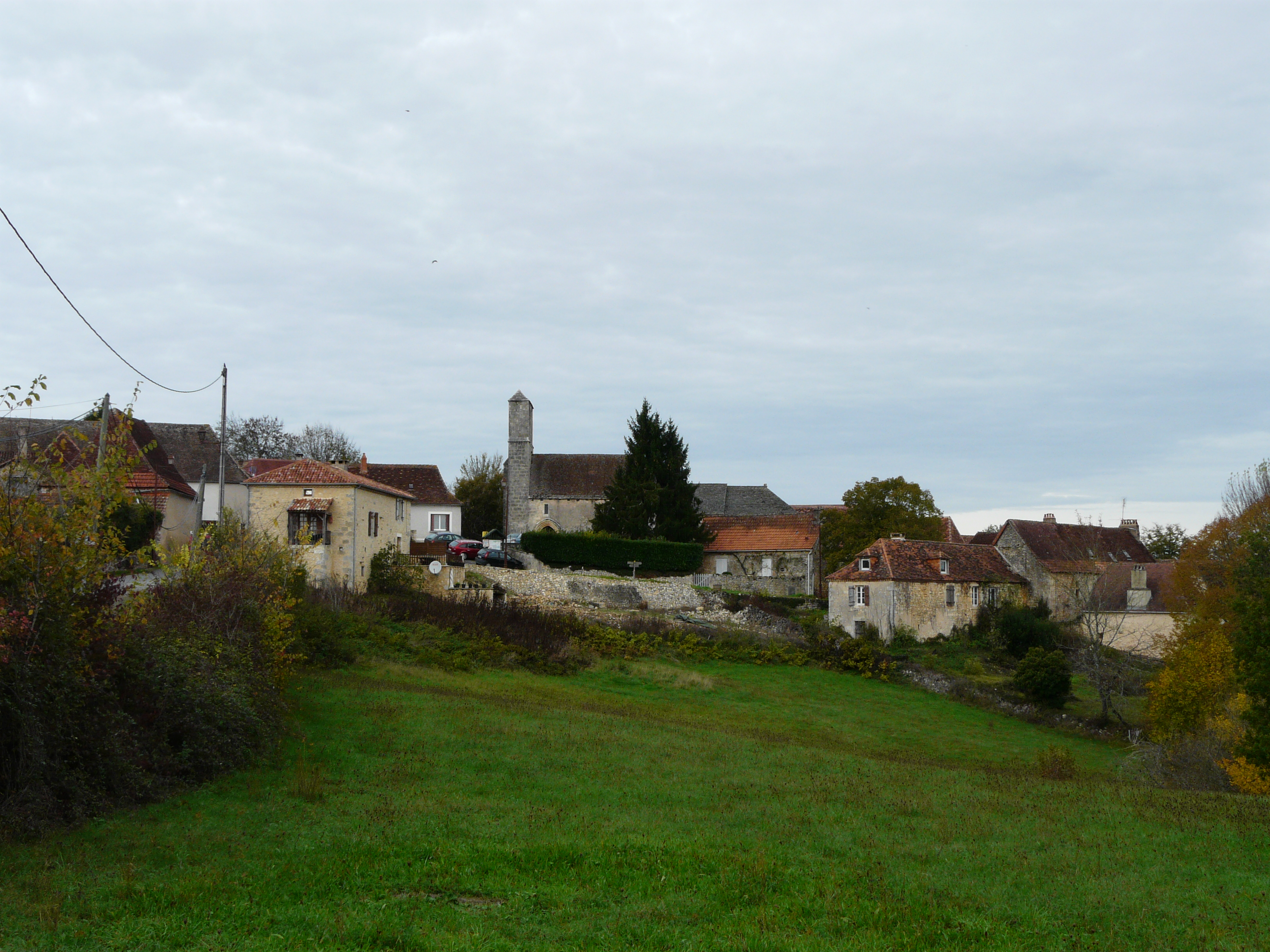 Le village de Montagnac-d'Auberoche, Dordogne, France.